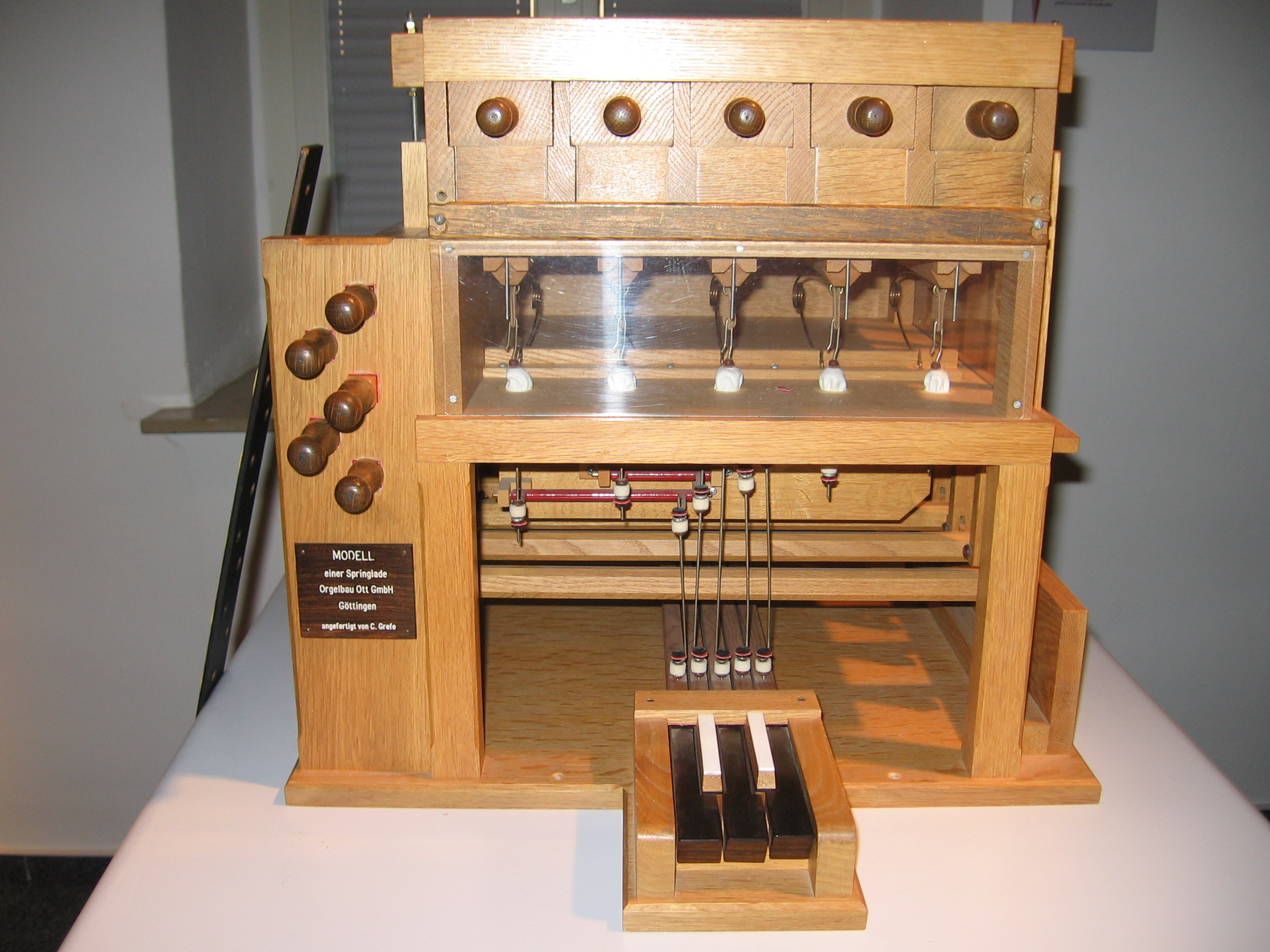 Springlade im Orgelmuseum in Borgentreich.